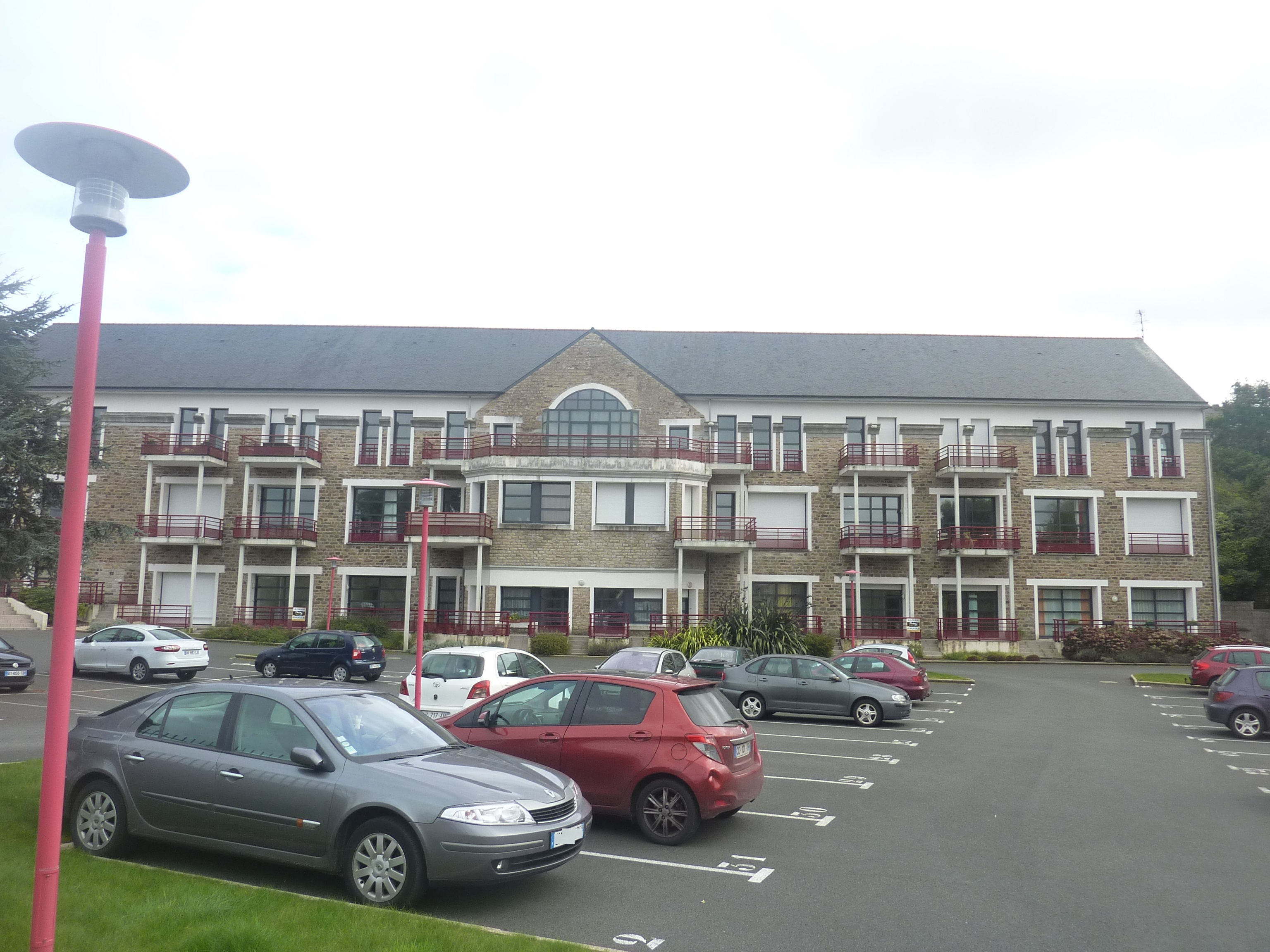 Rosporden : l'ancienne usine de cirages, encaustiques et produits d'entretien Mayola, reconvertie en appartements